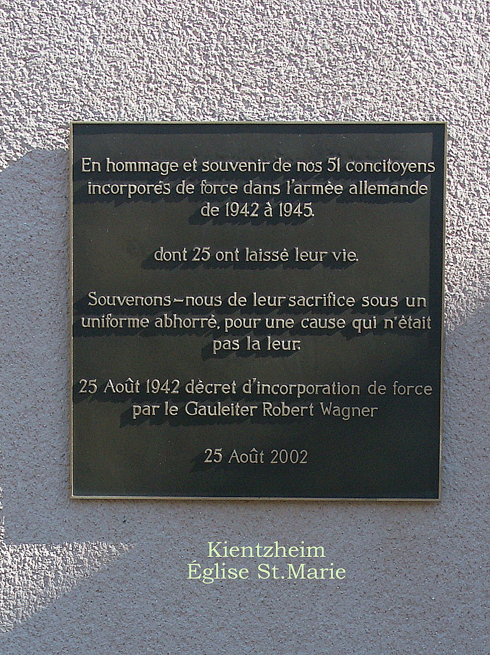 Gedenktafel an der Kirche von Kienzheim (Frankreich Dep. Haut Rhin) für die zwangsweise in die deutsche Wehrmacht einberufenen Bürger